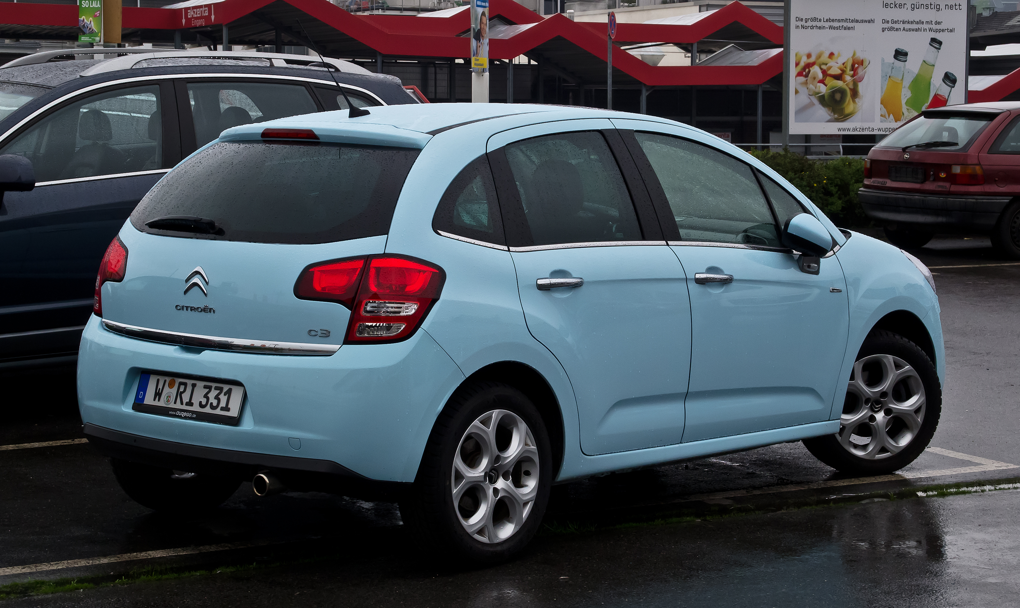 Citroën C3 VTi 120 Exclusive (II)